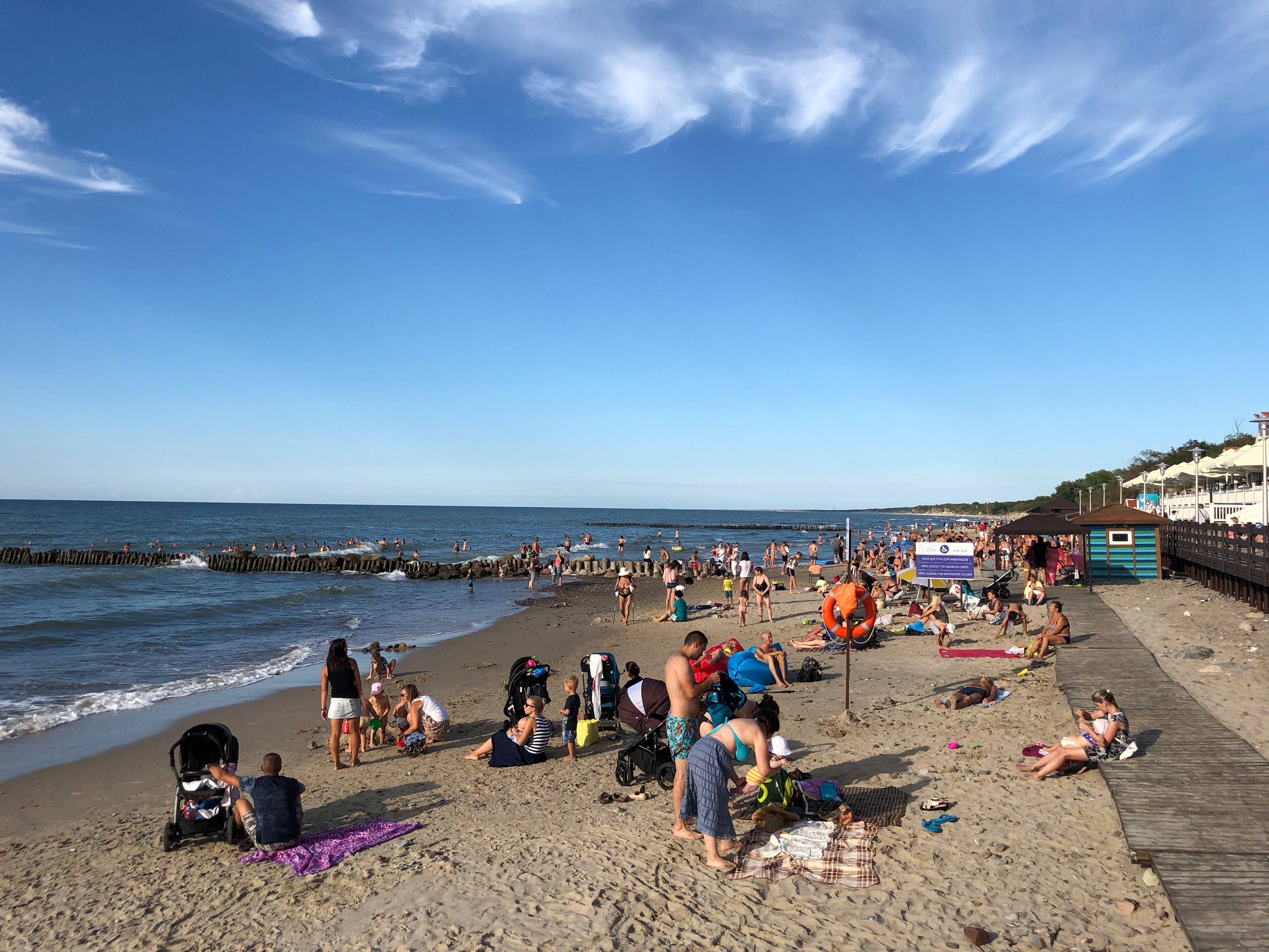 Заленоградск пляж